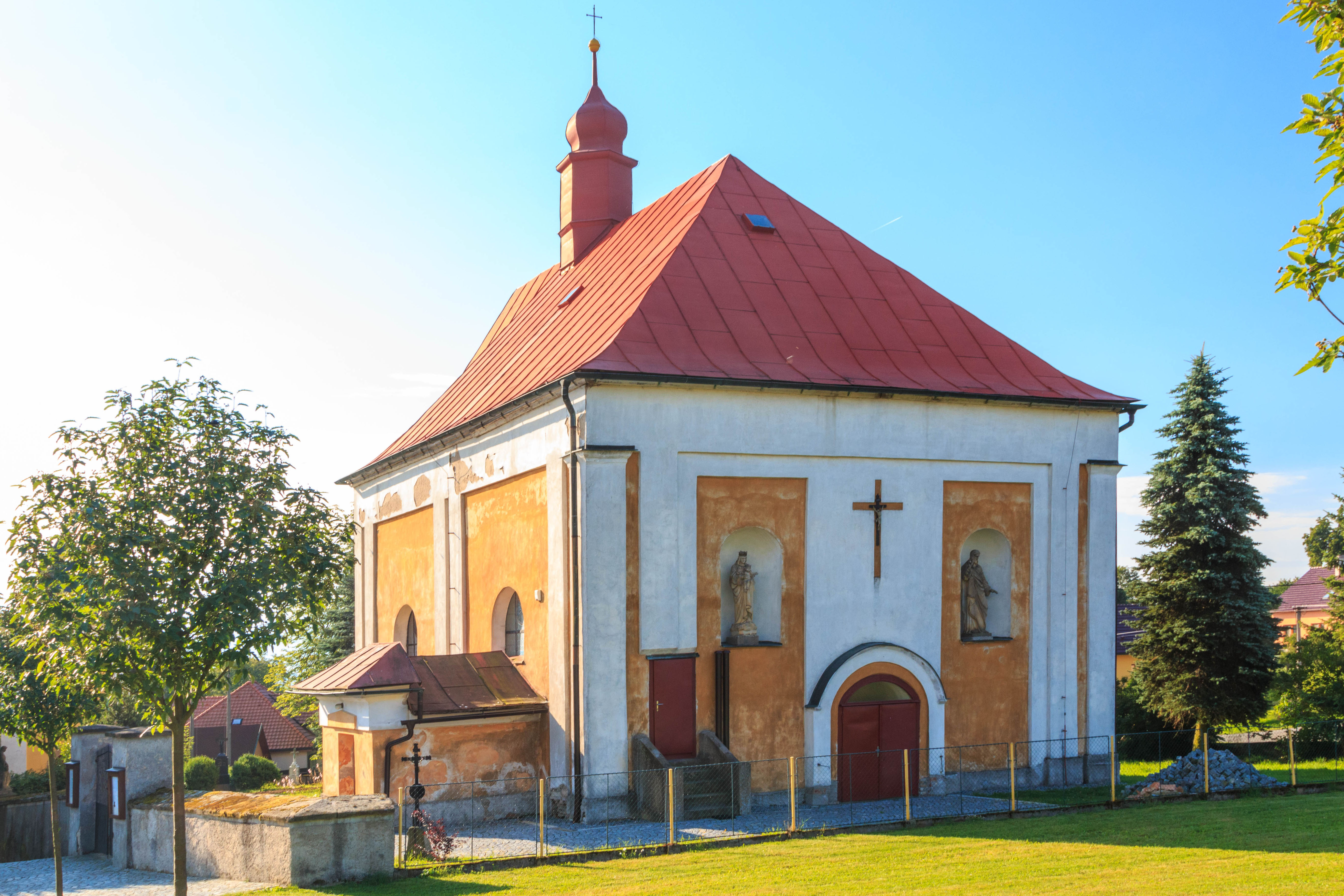 Čachotín vstupní portál kostela